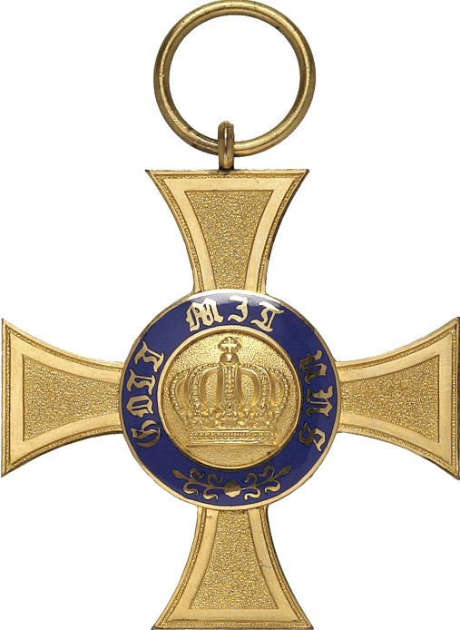 Königlicher Kronen-Orden (Preußen): Kreuz IV. Klasse (3. Modell), Avers.